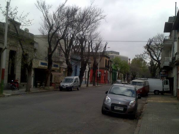 Foto del Barrio en el cual se encuentra el Jardín de Infantes N° 213 (Montevideo).jpg